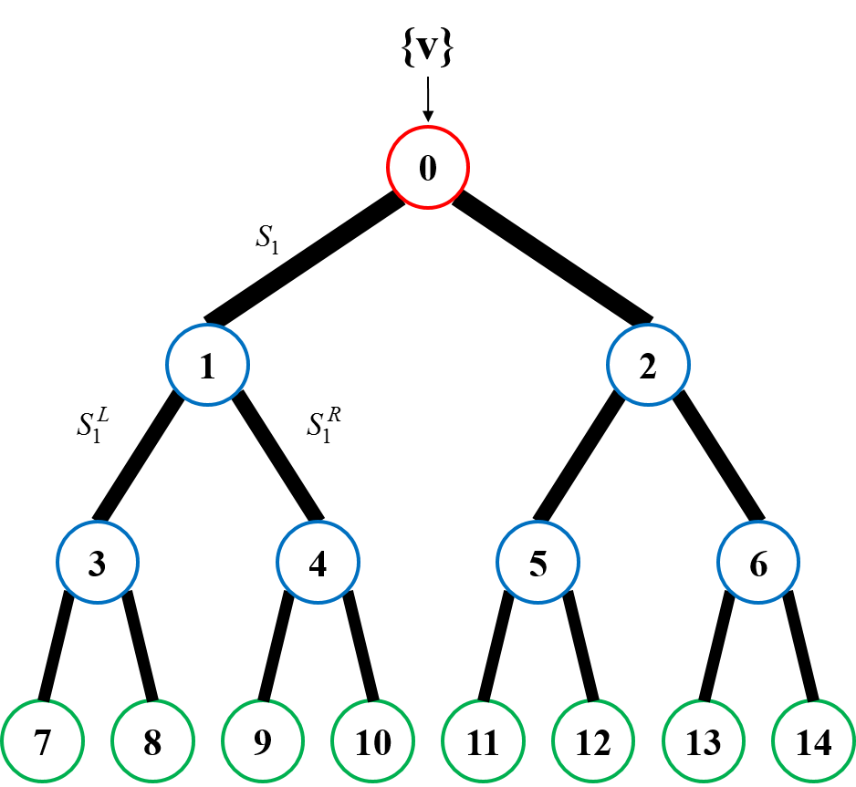 한국어 (조선): 하나의 결정 트리 내 학습 과정 예제